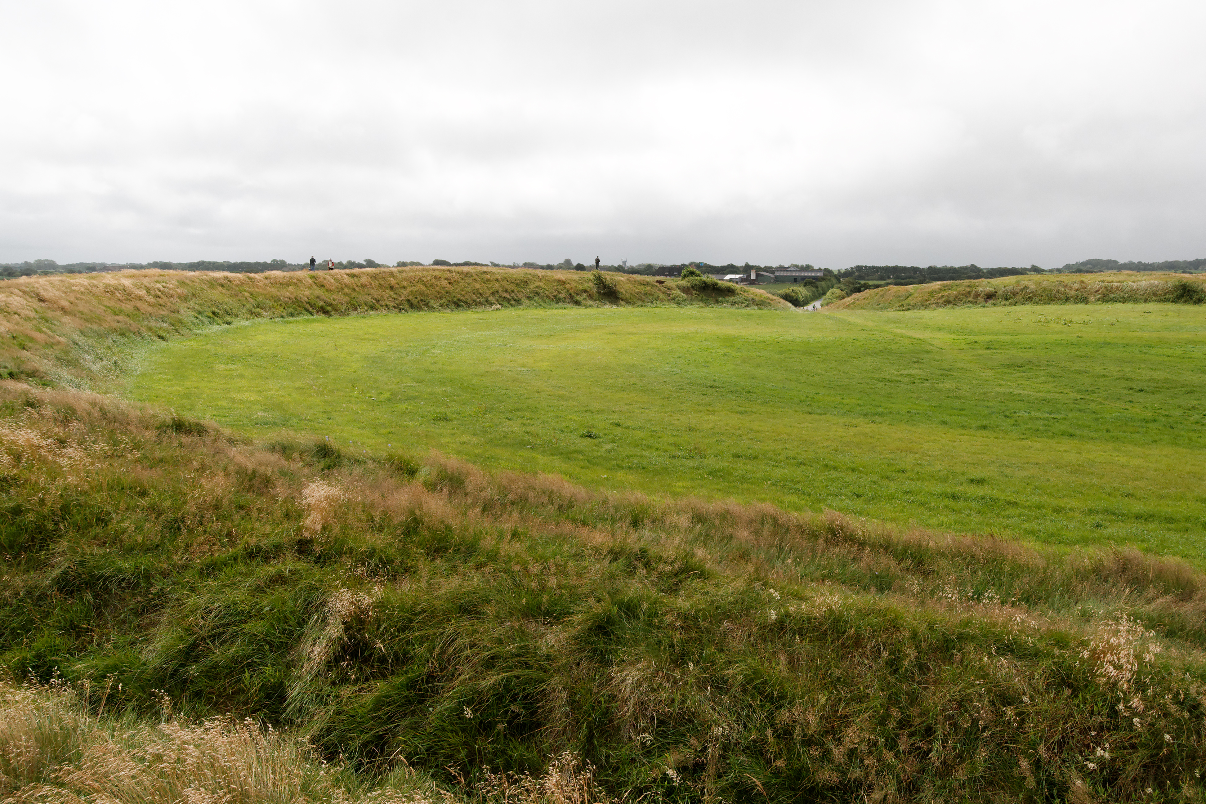 Archäologisches Denkmal Lembecksburg bei Borgsum, Insel Föhr. Ringwall aus dem 9./10. Jahrhundert. Blick in Richtung Süden.